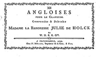 Forside til nodehæfte med musk af W.H.R.R. Giedde (1756-1816)